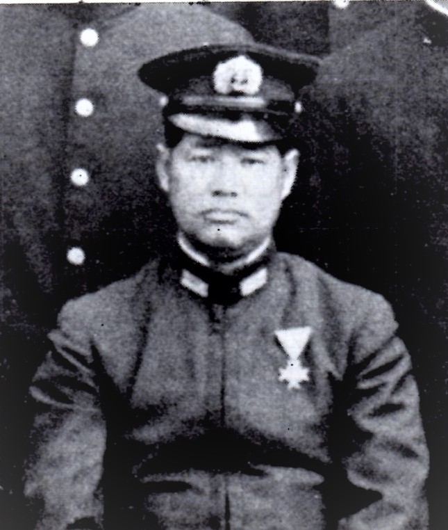 日本海軍第301海軍航空隊司令時代の八木勝利中佐